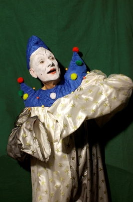 Der Mime Jean-Marie Bottequin